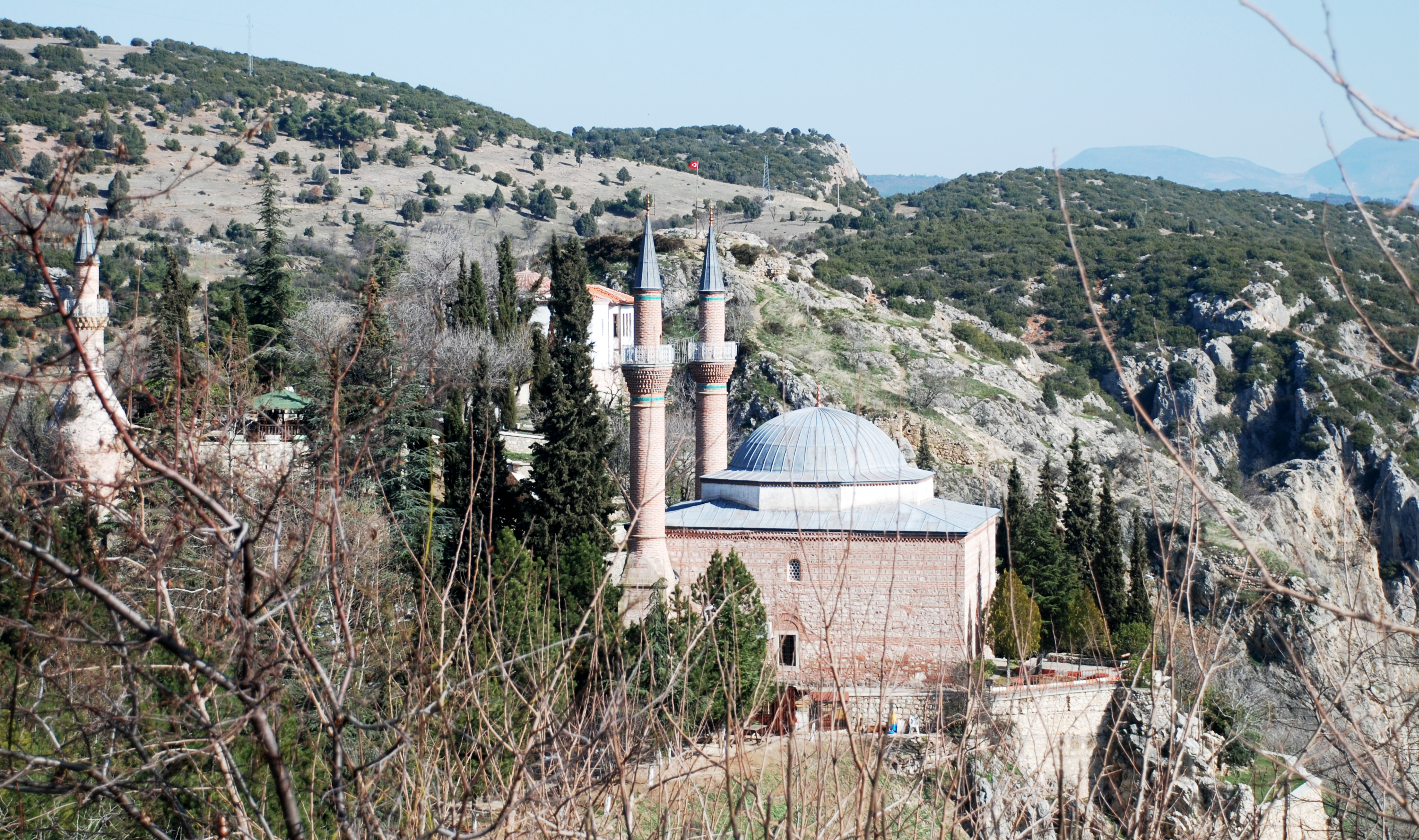 Şeyh Edebali'nin Bilecik'teki türbesi